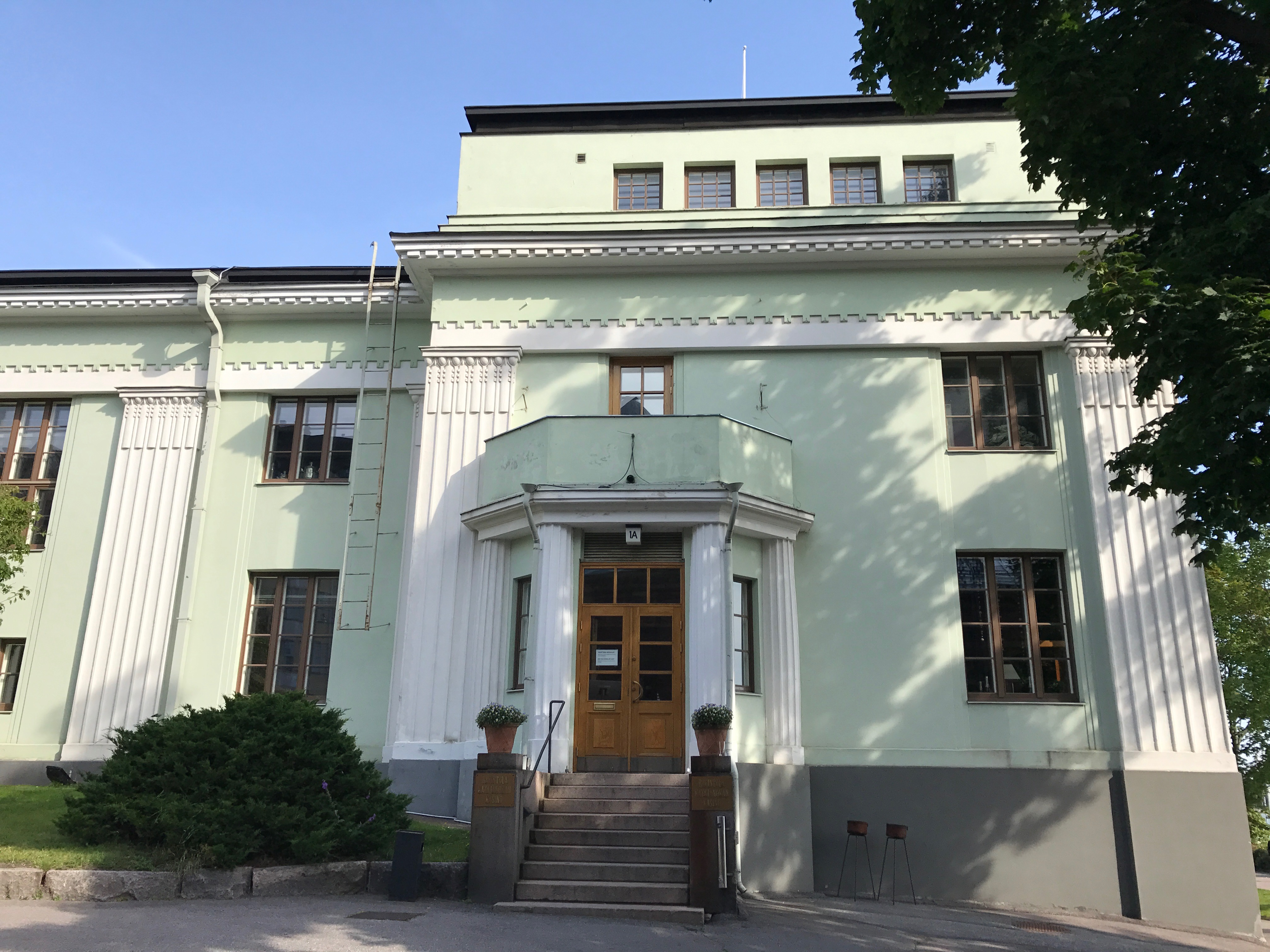 Katajanokan Kasino Helsingissä. Laivastokatu 1.